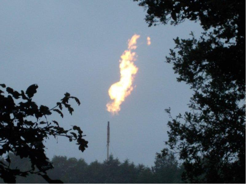 Gasbohrung, Gasfackel, Söhlingen-Ost Z4, ExxonMobil